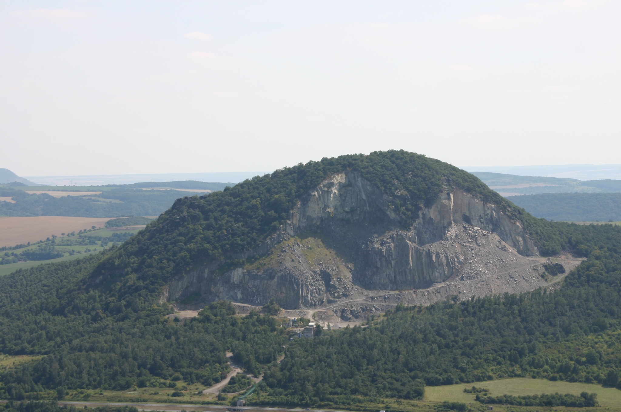 Kopec Želenický vrch v okrese Most